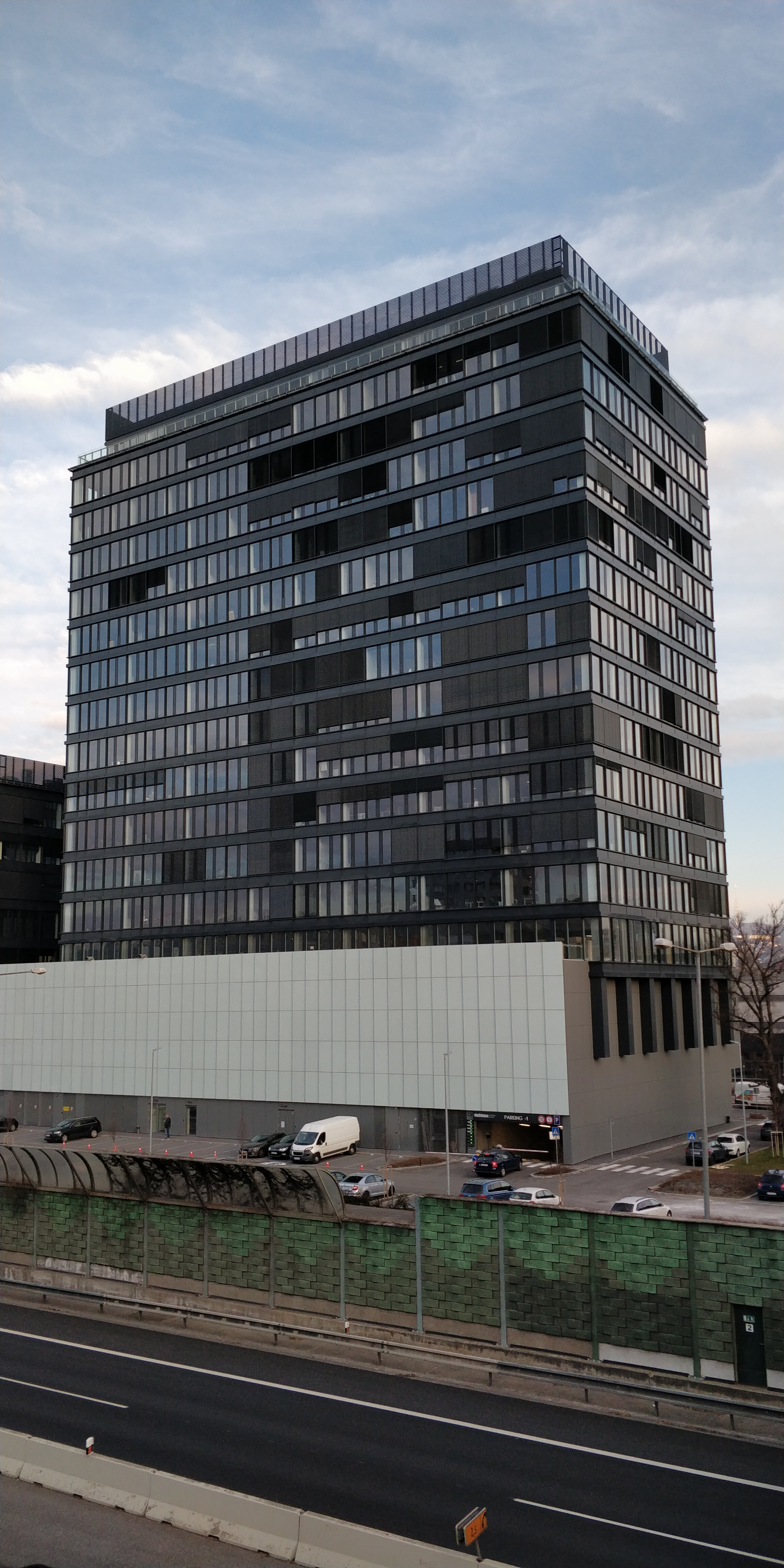 Einsteinova Business Center, Krasovského 14, Bratislava